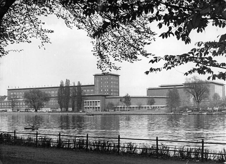 Berlin, Nalepastraße, Sendezentrum, Spree Zentralbild Deutsche Demokratische Republik 1.7.1970 schw Deutscher Demokratischer Rundfunk - Ätherwellen-Brücke zur Völkervrständigung Das Staatliche Runfunkkomitee hat seinen Produktion- und Sendekomplex in der Nalepastraße in der Hauptstadt der Deutschen Demokratischen Republik. Unser Foto zeigt die Aussenansicht, im Vordergrund die Spree. Reporter: Junge Copyright: ADN-Zentralbild (Bitte beachten Sie den Begleittext sowie die Fotos mit den Nummern J 0701-301-2 - 6 N)